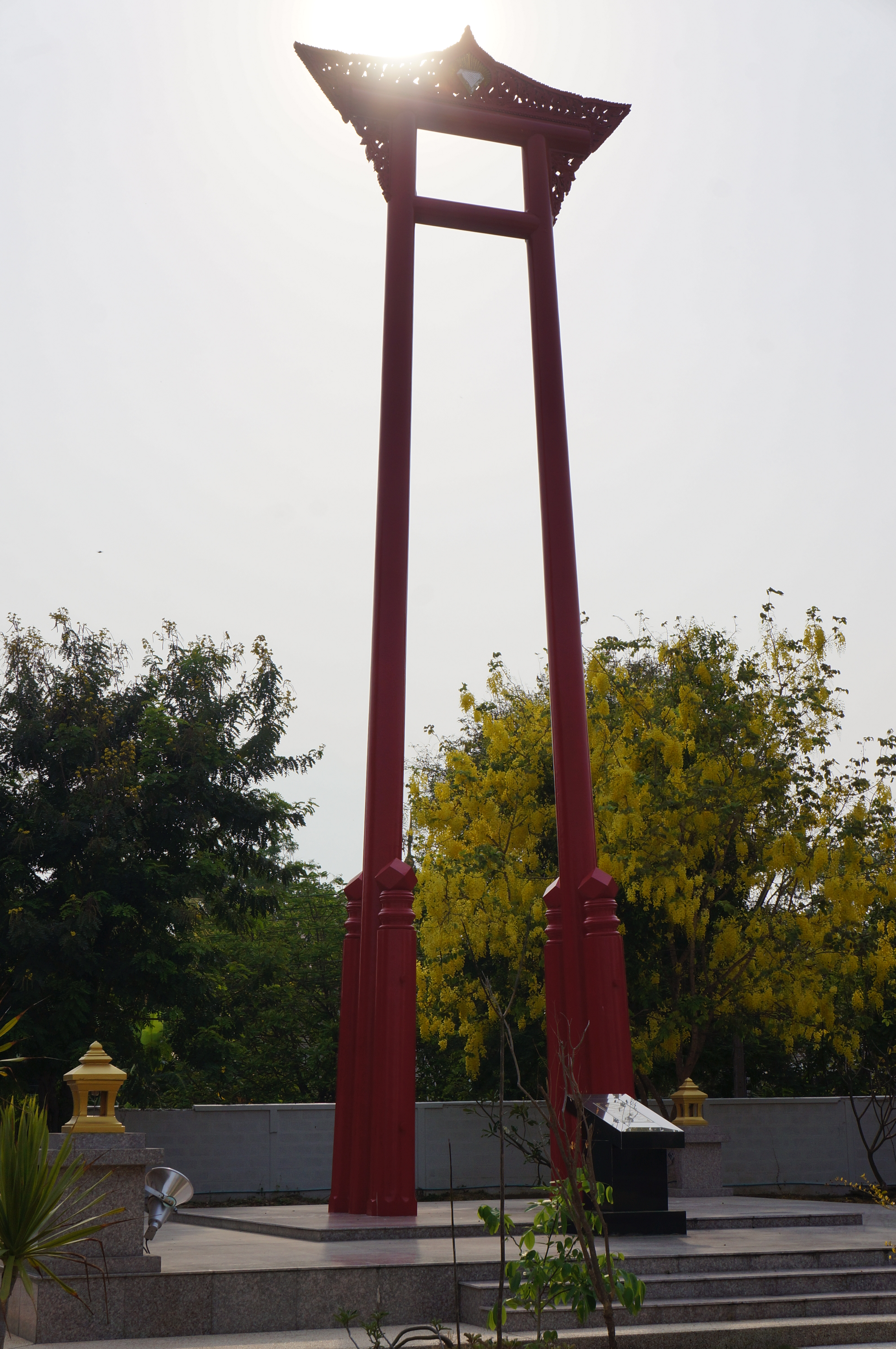 ปัจจุบันเป็นที่ประดิษฐานพระเขี้ยวแก้ว พระบรมสารีริกธาตุฉัพพรรณรังสี พระเสมหธาตุ และเป็นพิพิธภัณฑ์จัดแสดงพระพุทธรูปและโบราณวัตถุต่างๆที่พบในวัดเพชรพลี